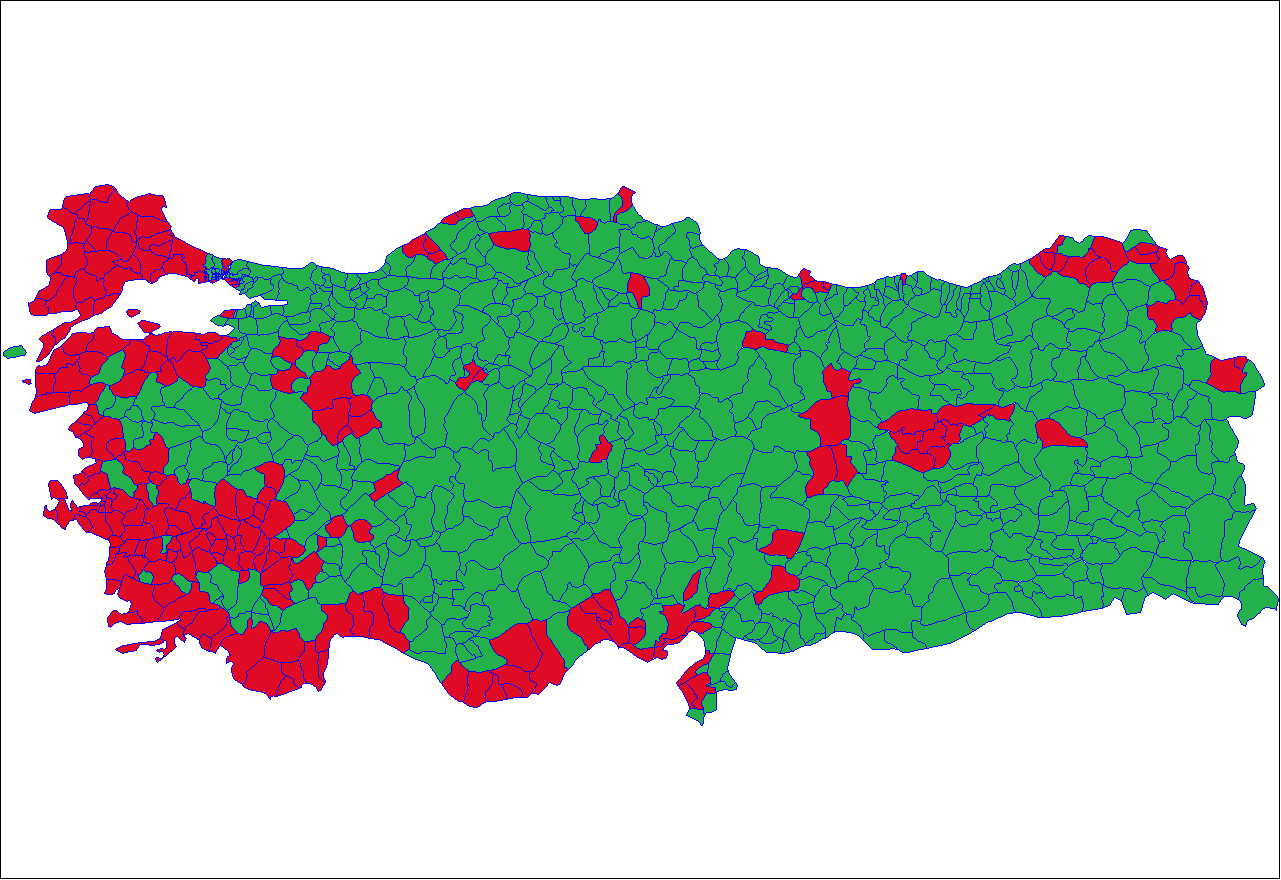 2010 referandumu ilçeler